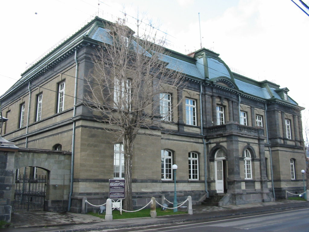 旧日本郵船小樽支店（1906年、北海道小樽市、設計：佐立七次郎） 撮影者：投稿者 撮影日：2004年4月24日